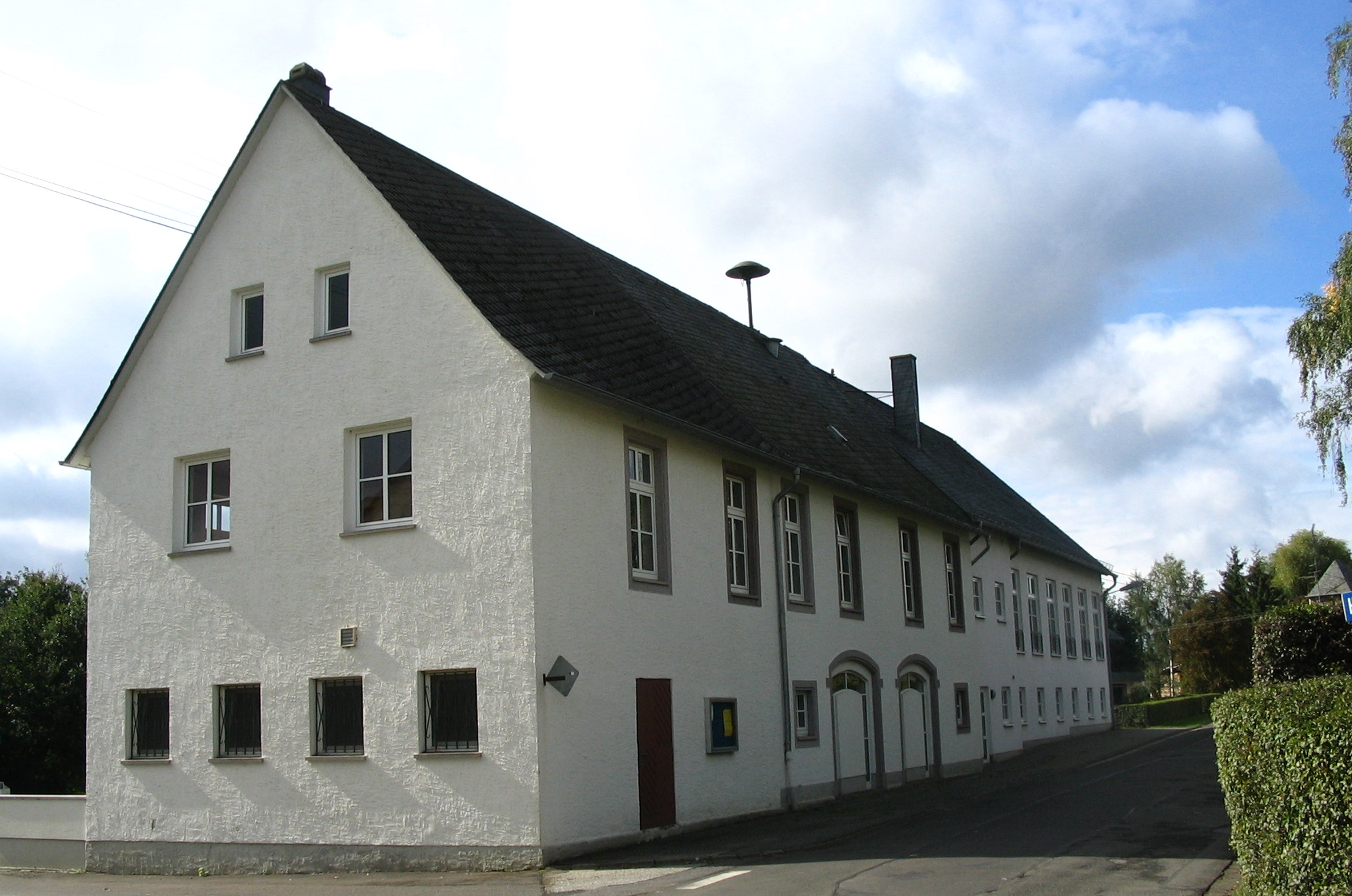 historisches Wiegehäuschen in Klosterkumbd (Hunsrück)